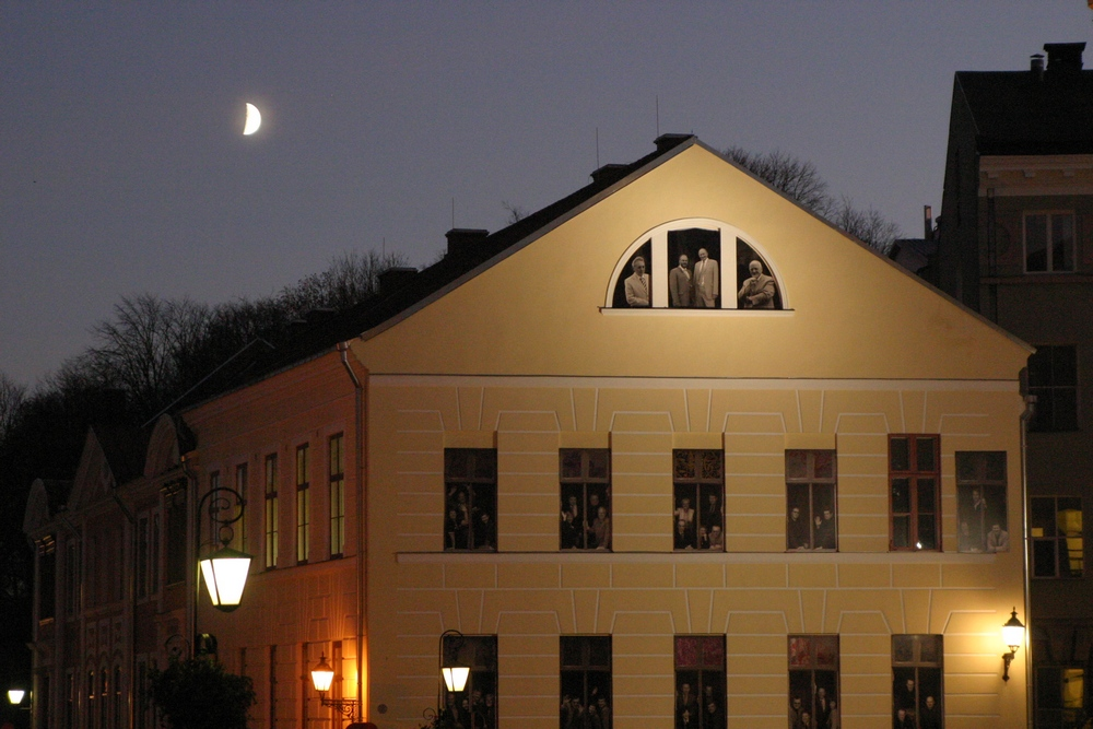 Välisvalgustus Tartu Ülikooli juures (von Bocki maja)